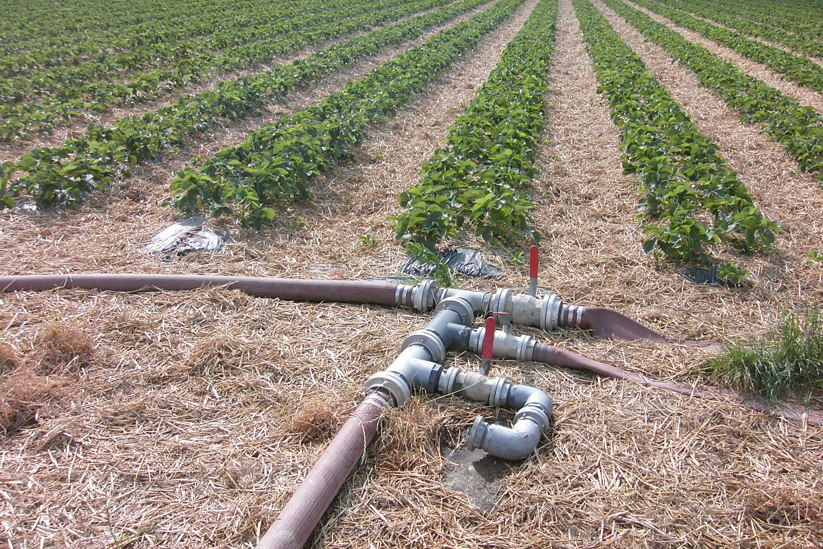 Erdbeerfeld, Schläuche zur Bewässerung und gleichzeitiger Düngung. Das Feld hat eine Größe von 30 Hektar (rund 40 Fußballfelder); die Gesamtheit der Schläuche lässt die Frage aufkommen, wer da noch durchblickt!